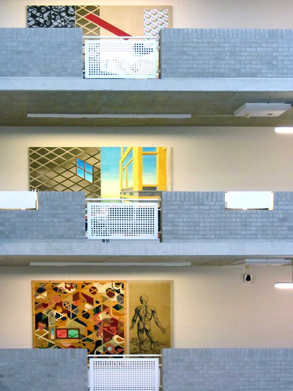 Zonder titel zicht op drie van de vier schilderijen door Ab van Hanegem - LUMC te Leiden